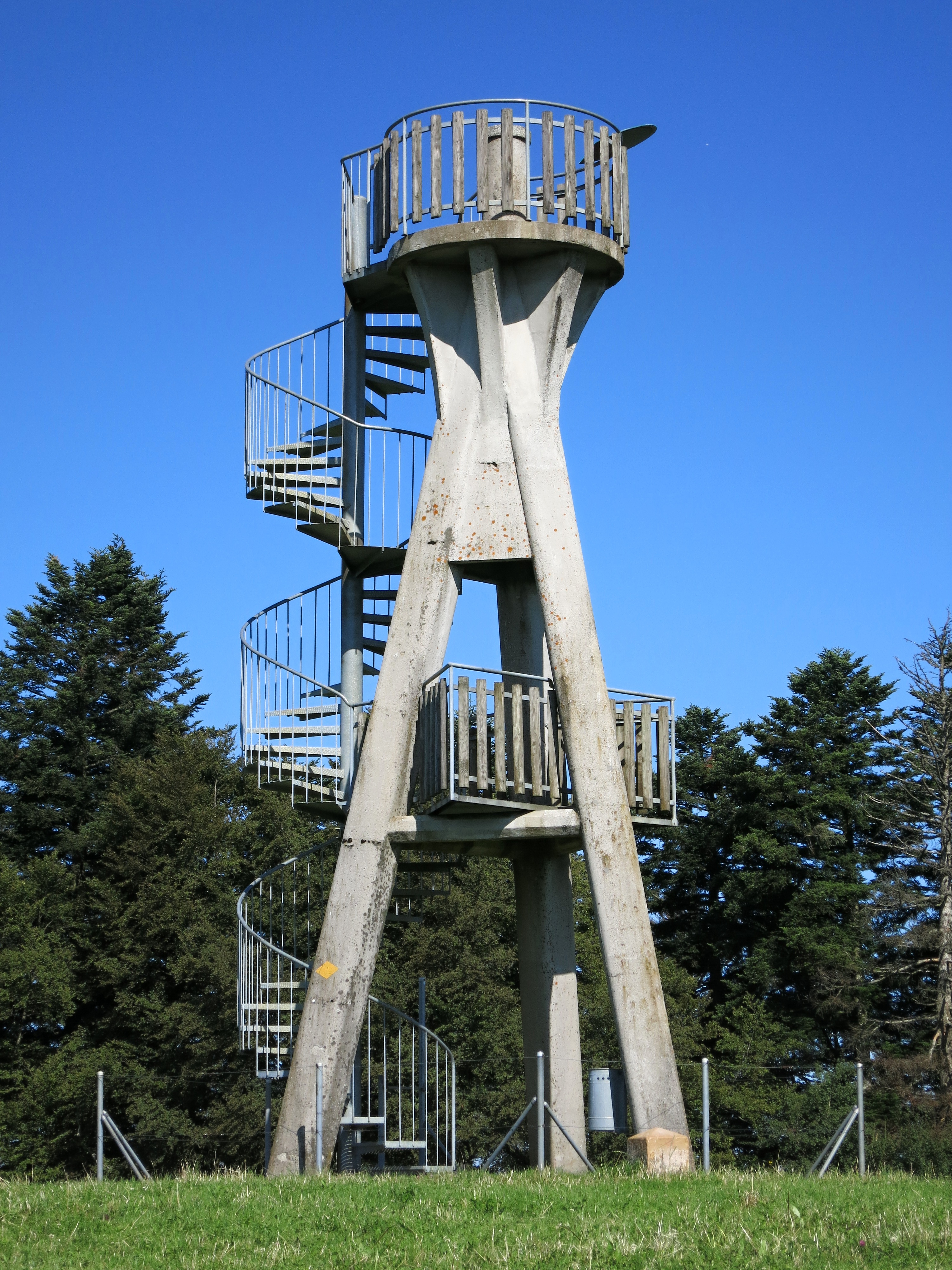 Aussichtsturm Faux d'Enson